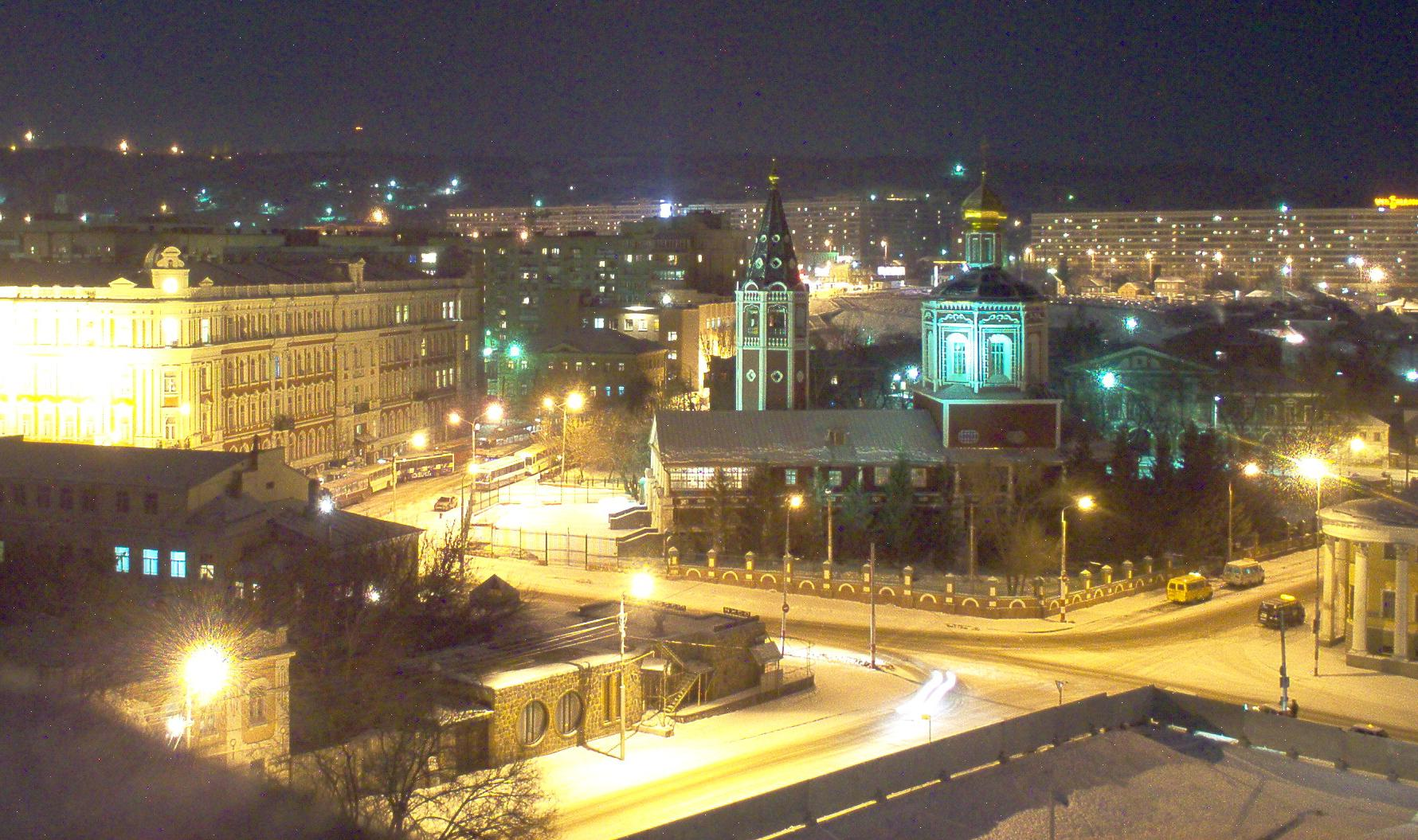 Троицкий собор на Музейной площади в Саратове, сфотографировано ночью из гостиницы на берегу Волги. Trinity Church in Saratov (Oblast Saratov, Russia) in a winter night, photographed from a Hotel at the Volga beach